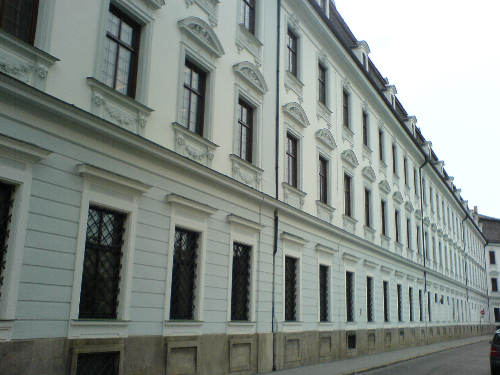 Das Augsburger Schaezlerpalais in der Seitenansicht.